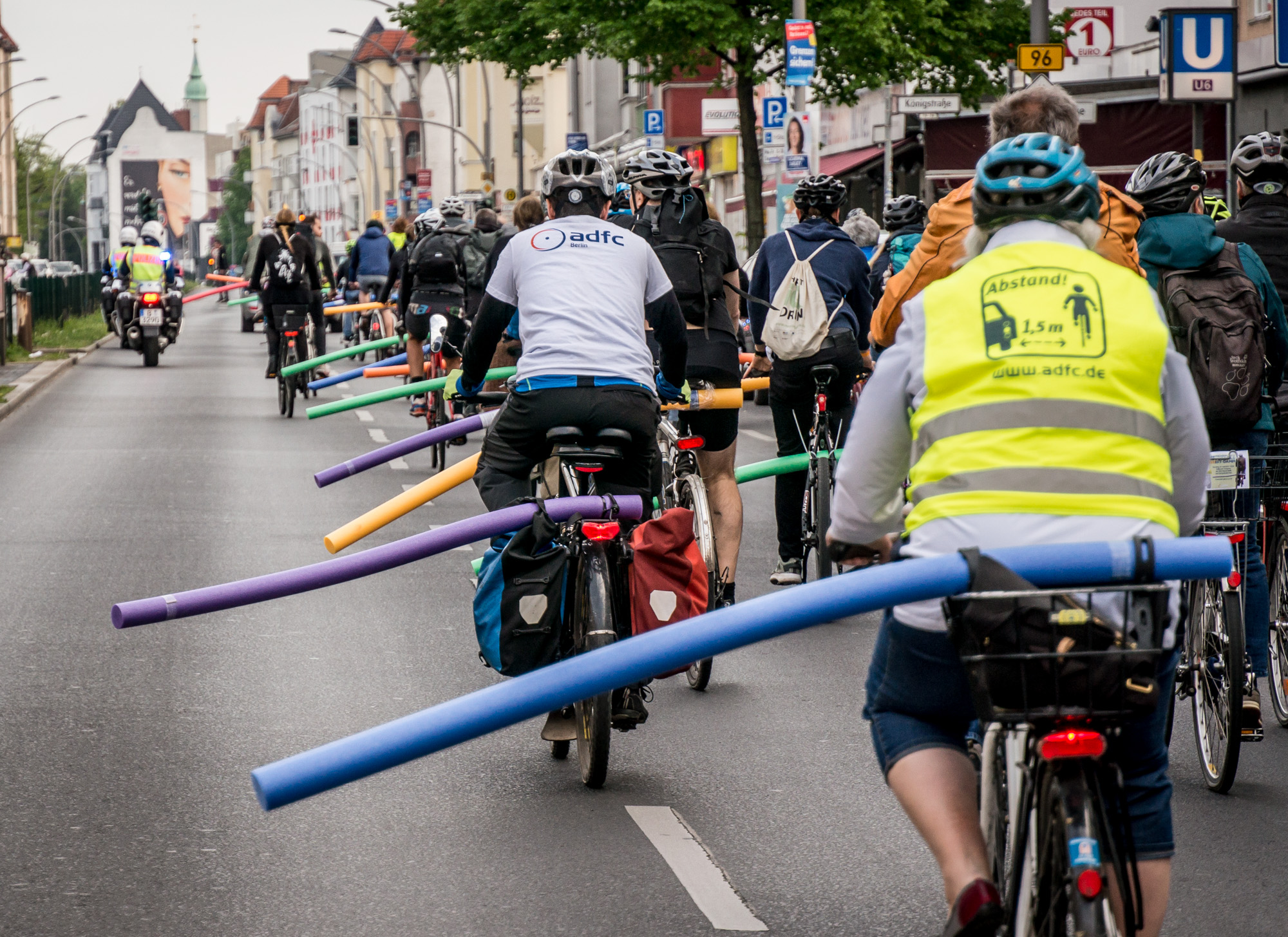 Fahrraddemonstration des ADFC Tempelhof auf dem Tempelhofer Damm in Berlin. Die Teilnehmenden haben Schwimmnudeln als Abstandhalter auf den Gepäckträgern befestigt.